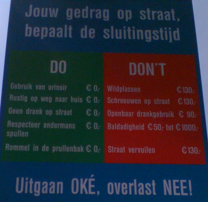 Freundliches Hinweisschild (NL)